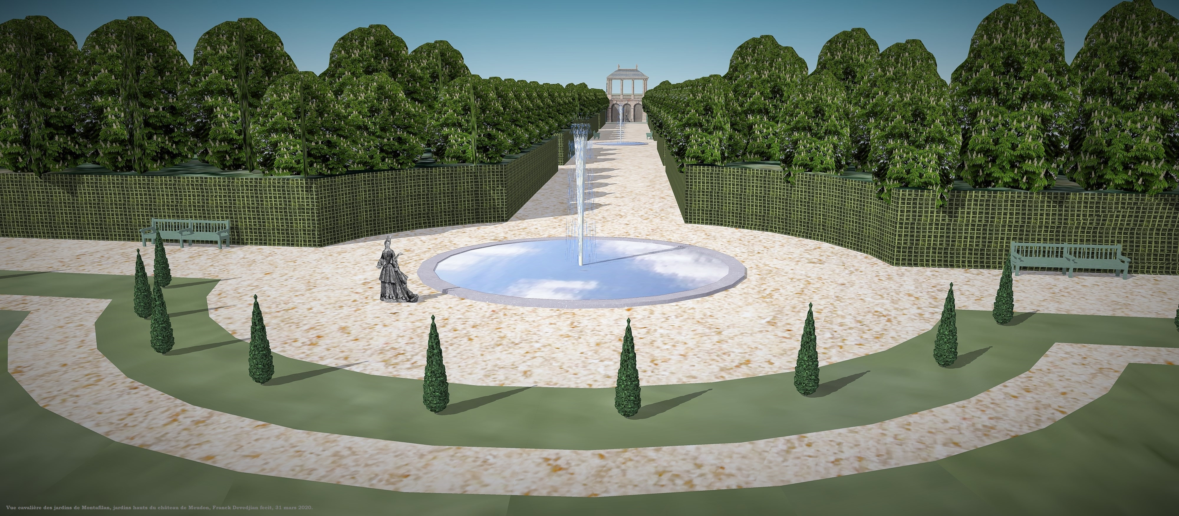 Vue cavalière des jardins de Montafilan, avec le cabinet de pierre